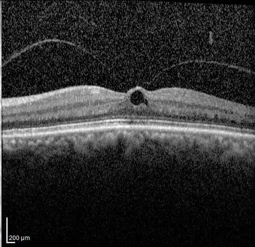 בדיקת OCT של חור מקולרי קטן בעין ימין